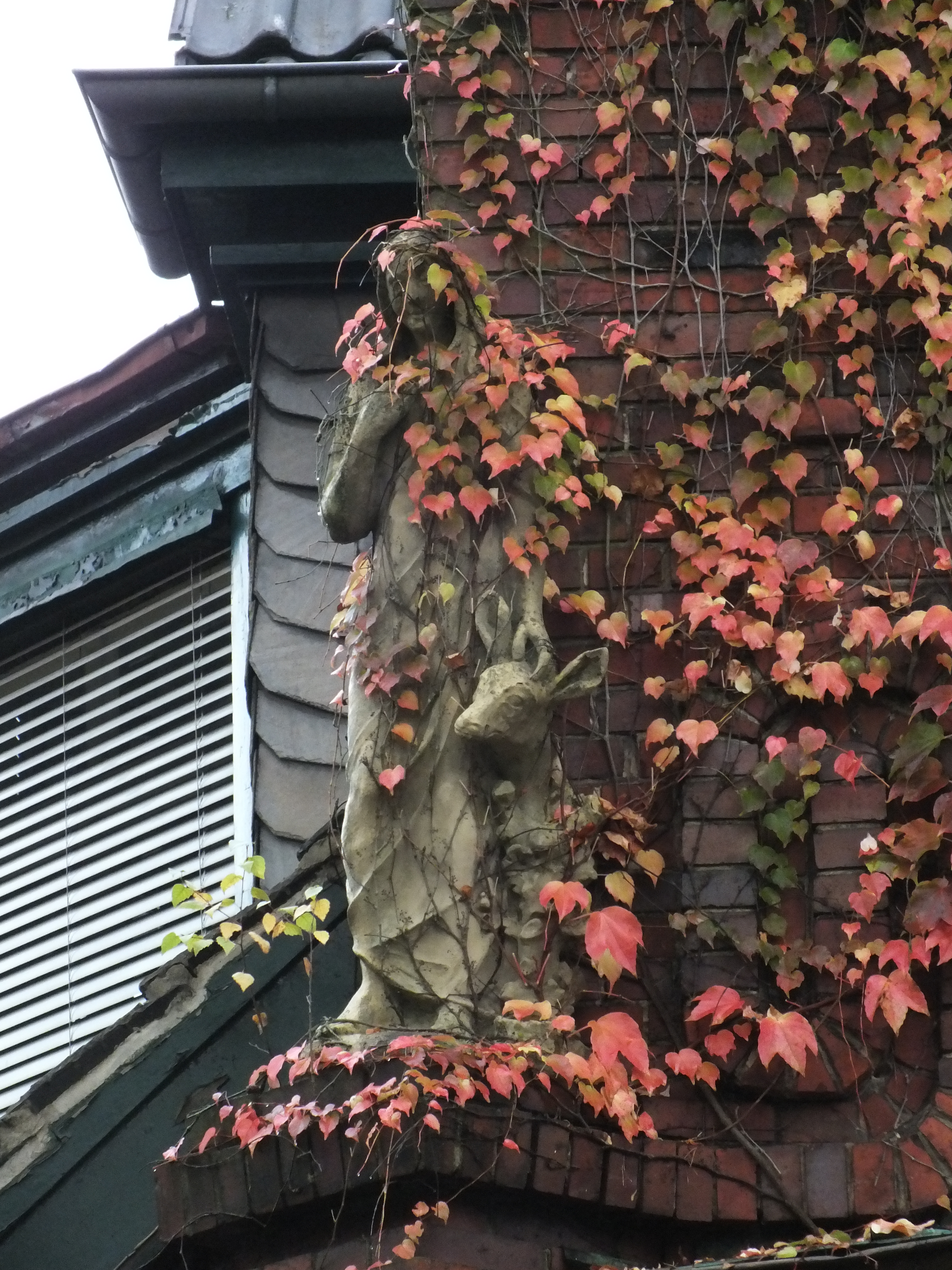 Baudenkmal in Frohnau, Benediktinerstr. 12